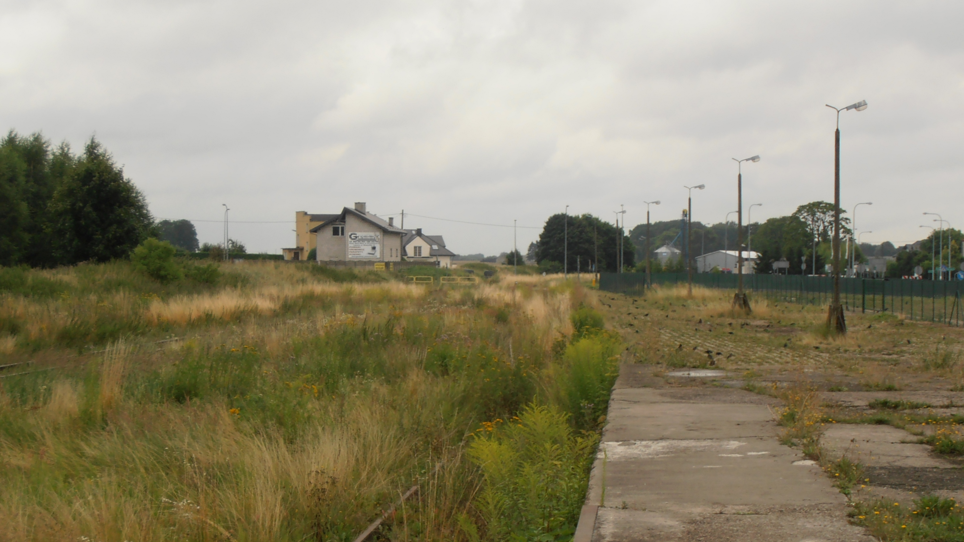 Lubawa (woj. warmińsko-mazurskie). Dawny teren stacyjny, zdjęcie zrobione z dawnej rampy.